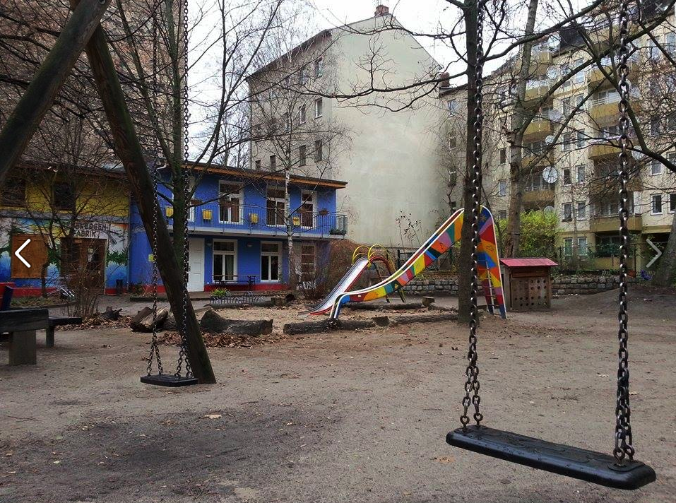 Regenbogenfabrik (Spielplatz - Neues Hostelgebäude) - 1981 besetztes und heute legales Alternativprojekt in Berlin-Kreuzberg, Germany.